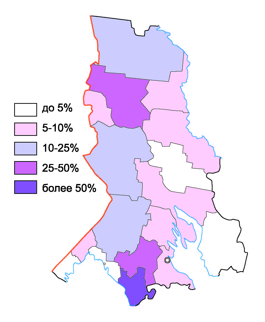 Доля карел по районам Республики Карелия